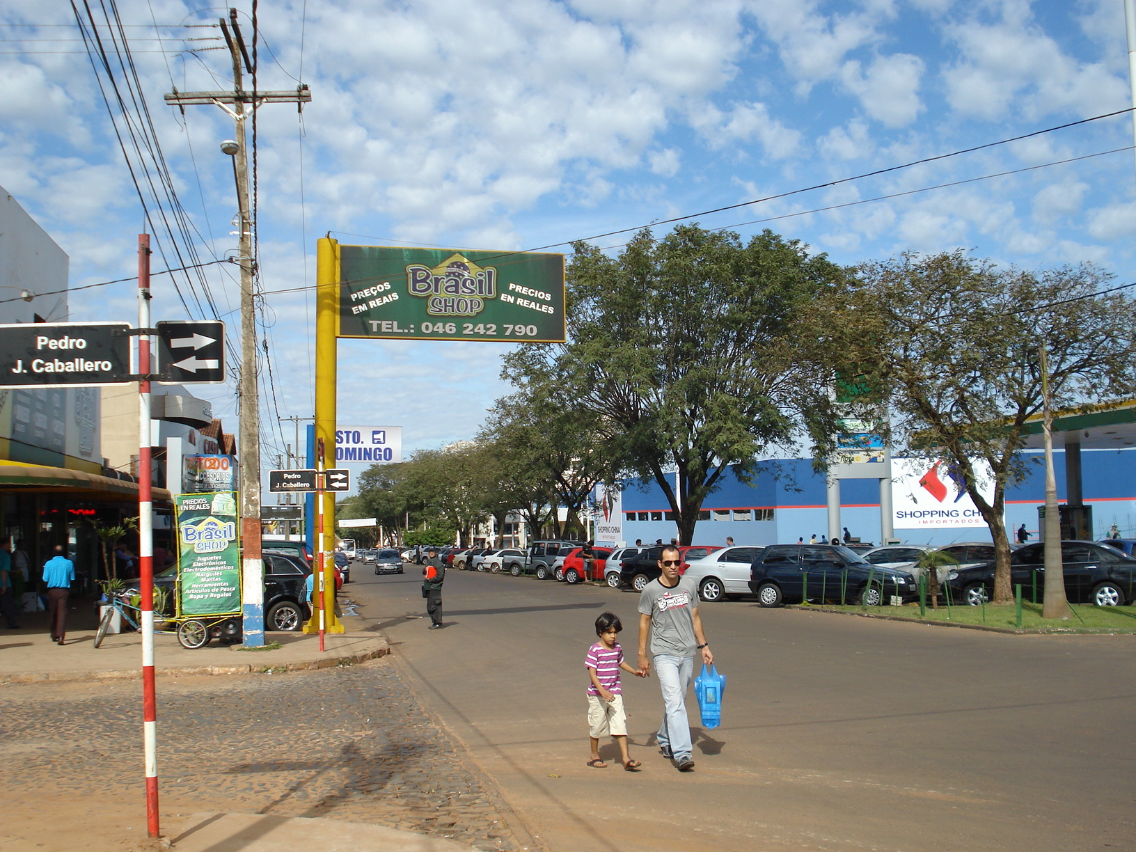 Avenida Paraguay